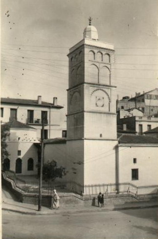 Djamaa el Kebir - Grande mosquée de Mascara. Photo prise début du XXe siècle.